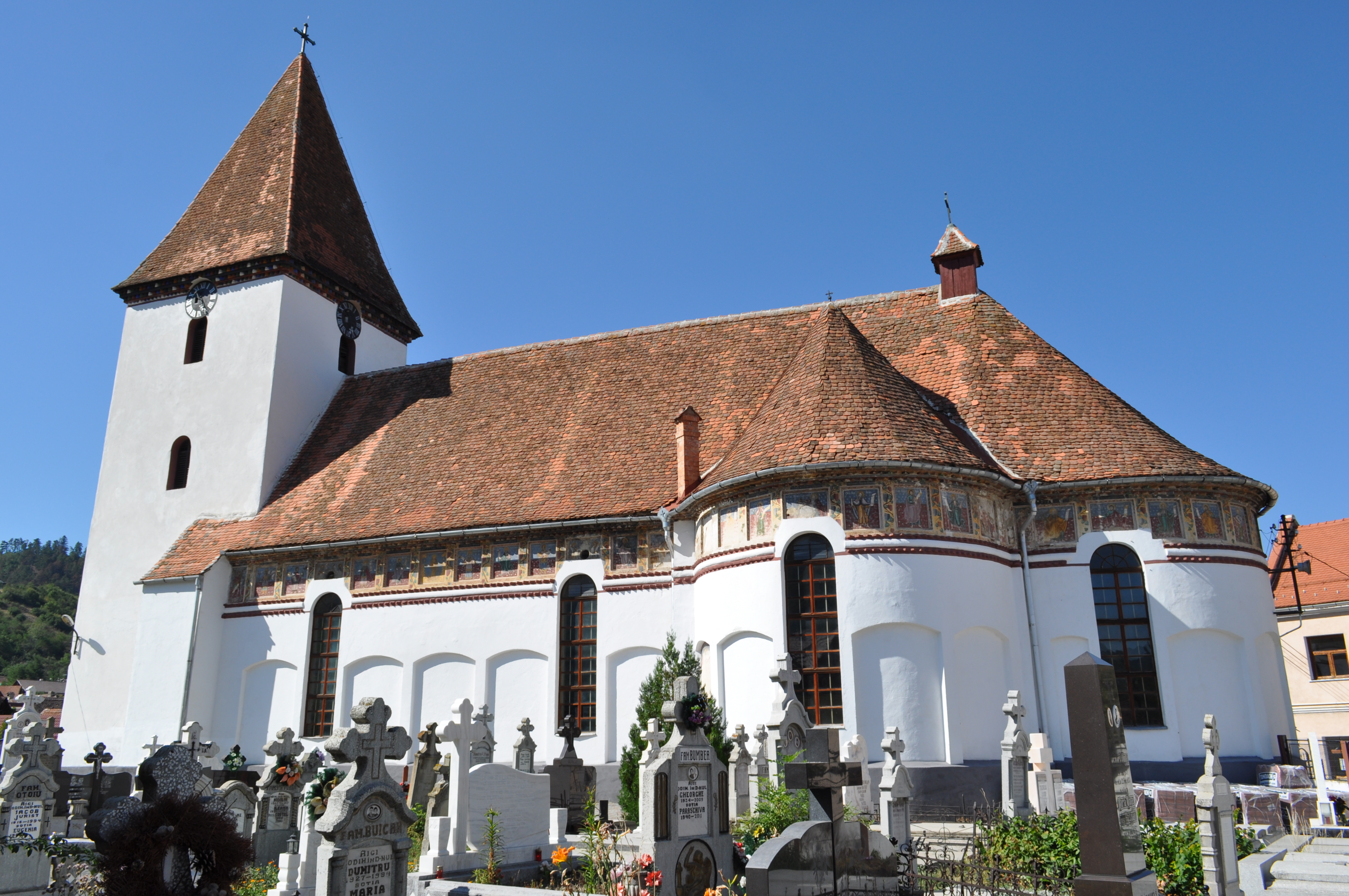 Biserica "Înălţarea Domnului" , oraş SĂLIŞTE